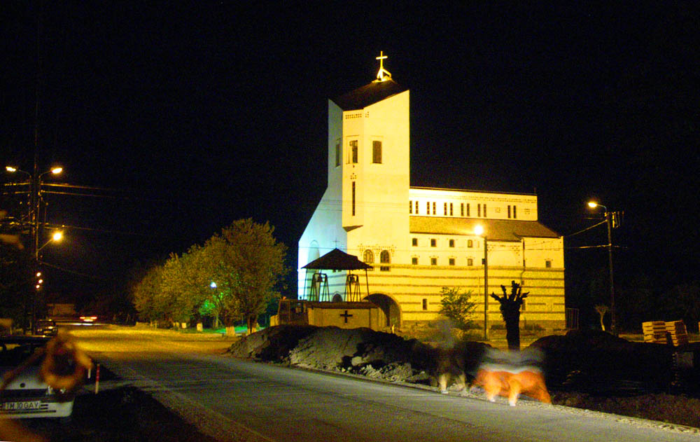 Dumbrăviţa, lângă Timişoara. Noua biserică ortodoxă în nocturnă. Foto: Alexandru Baboş, aprilie 2007. Licensing Categorie:Imagini din Banat